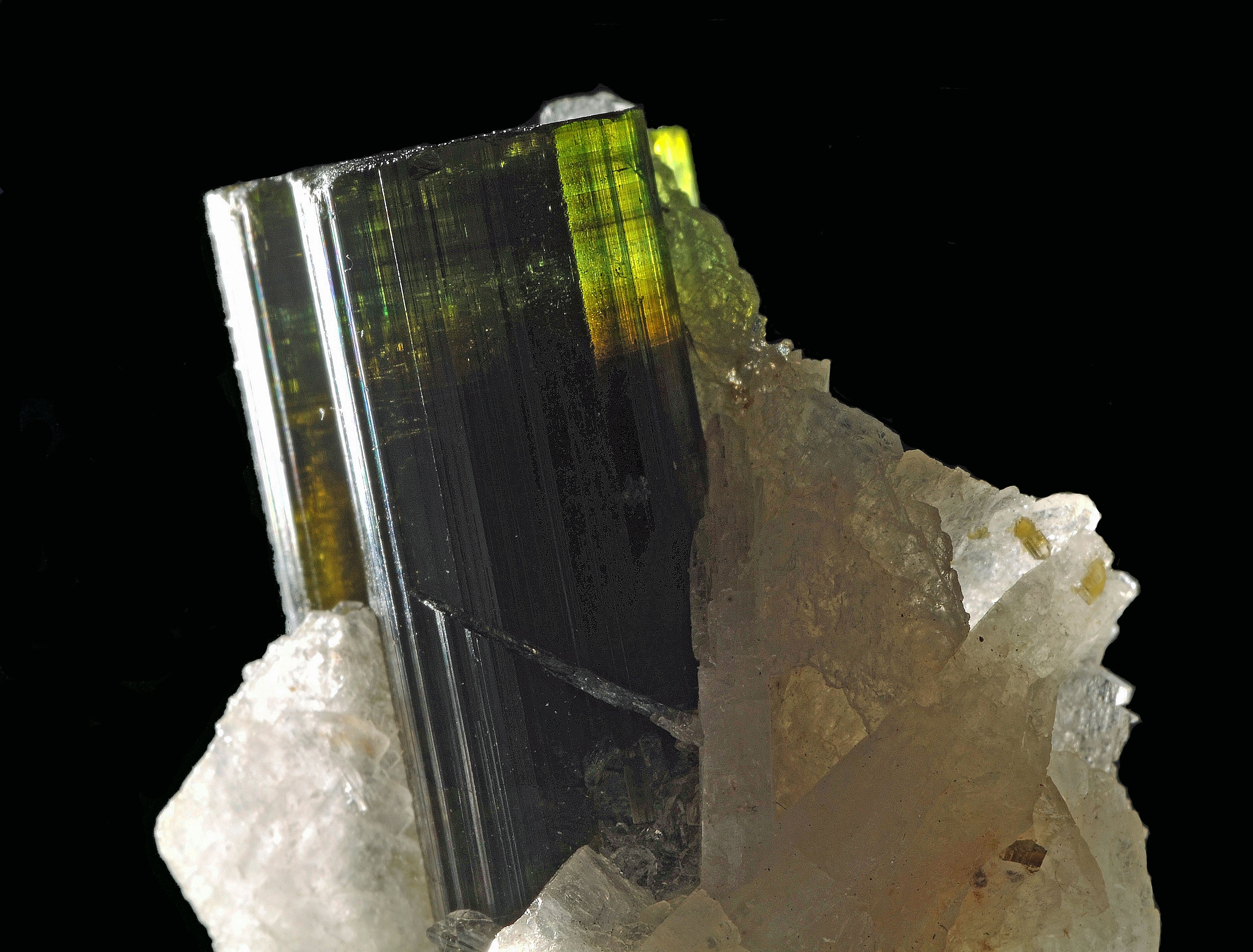 cristaux de tourmaline var. elbaïte sur microcline var. albite